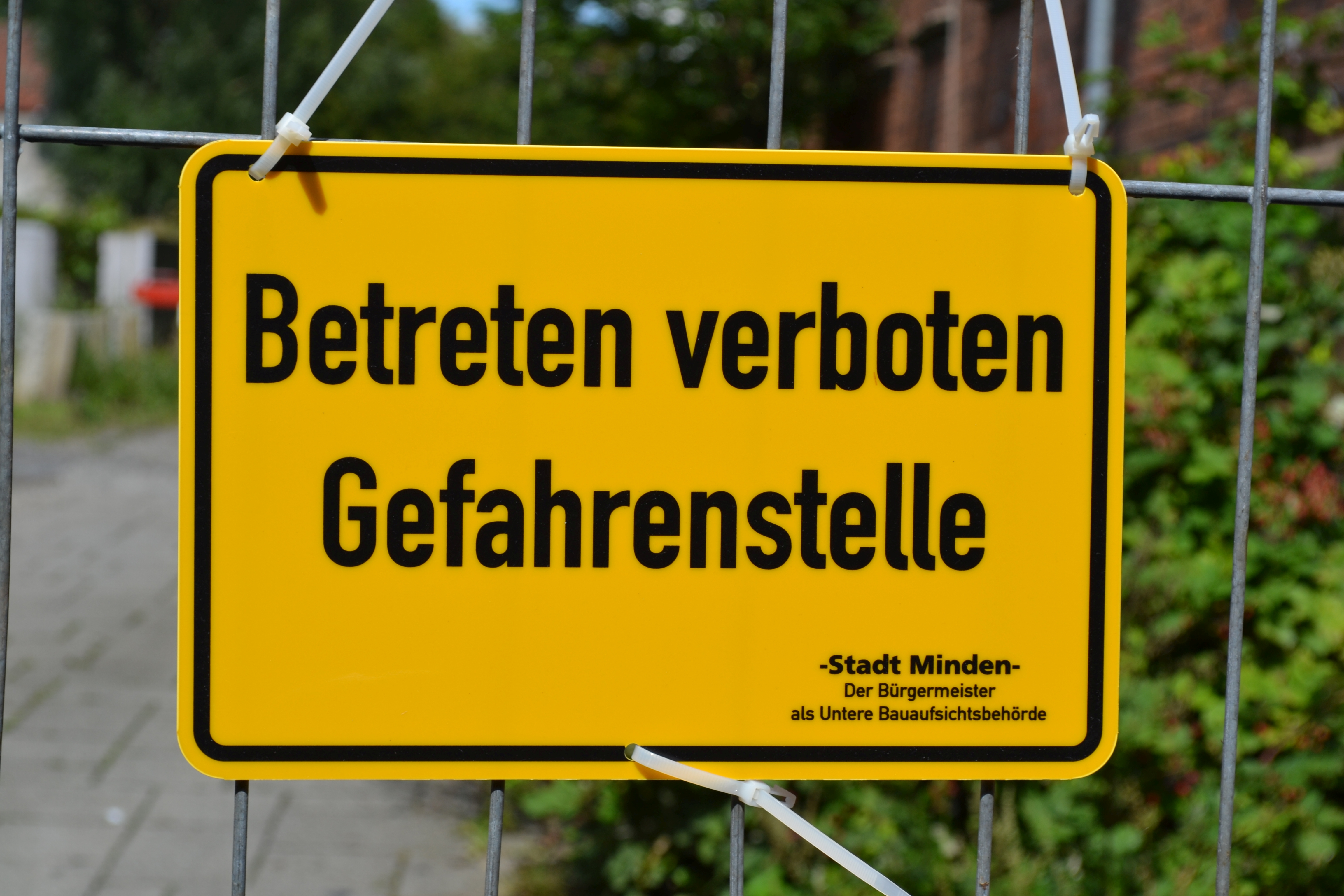 Bahnhofskaserne Minden nach dem Brand August 2015, Sicherungsschild der unteren Baubehörde